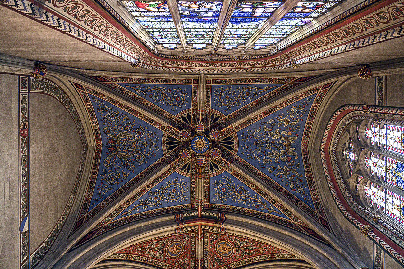 Makkabäer-Kapelle der Kathedrale St. Peter in Genf, Schweiz (Decke über Eingangsbereich)